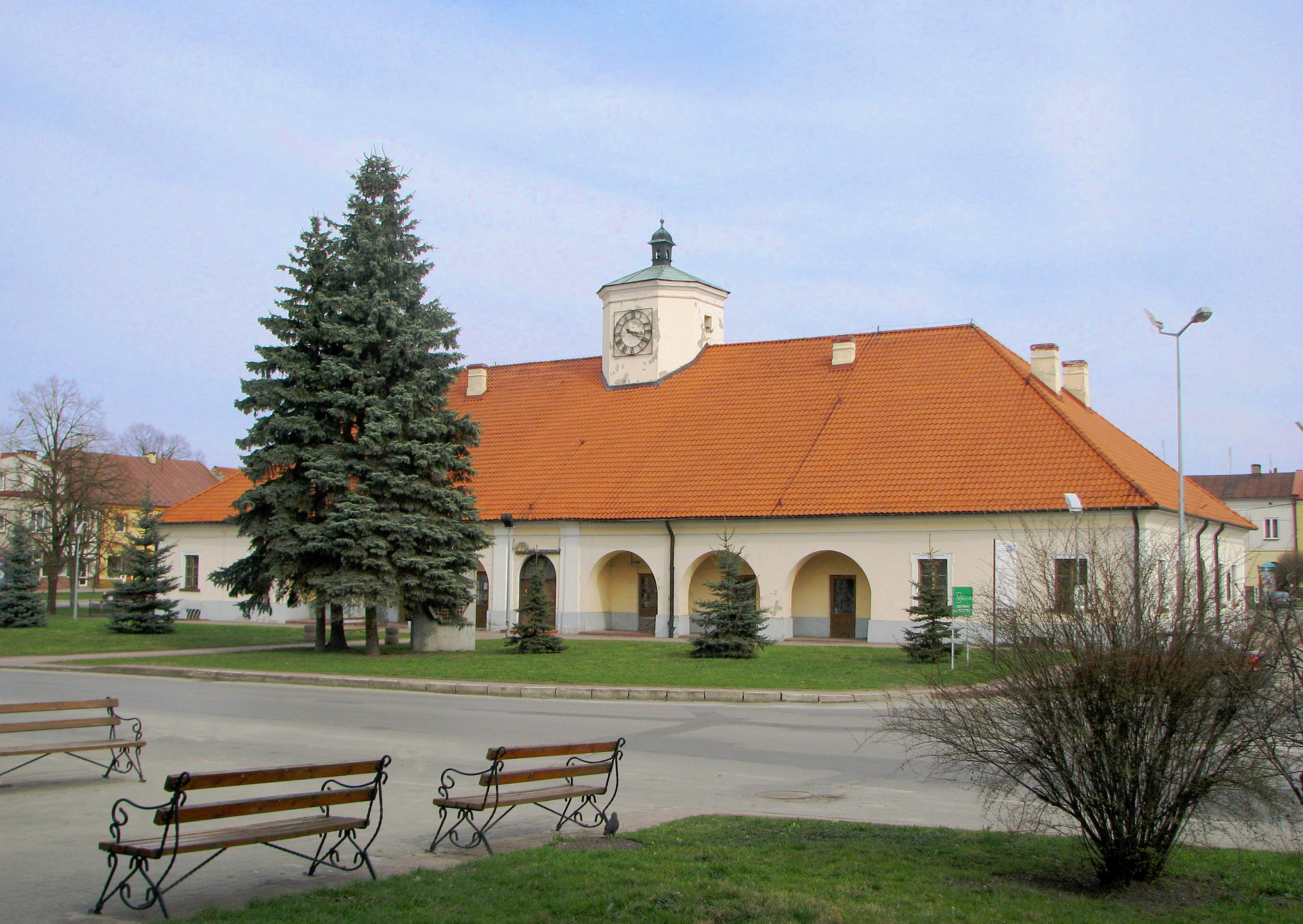 Ratusz w centrum rynku, Staszów, Polska. Elewacja od strony zachodniej.